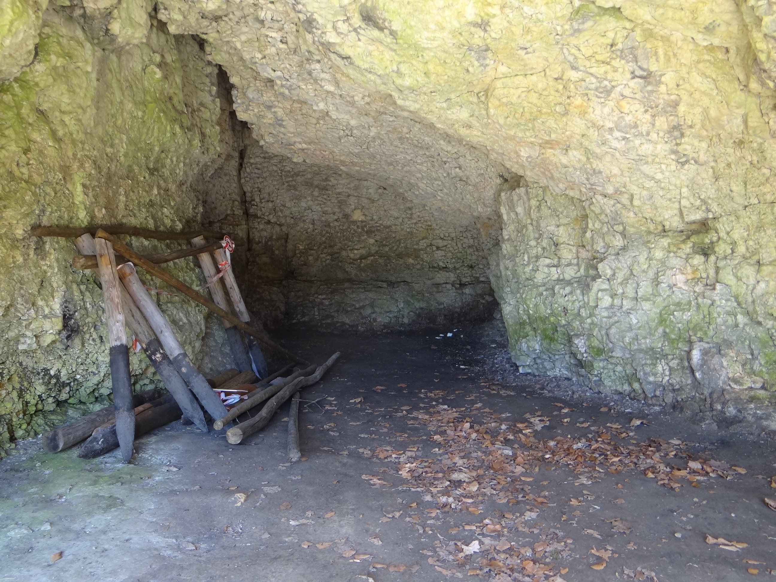 Schronisko Krowie (Jaskinia Krowia) w Ojcowskim Parku Narodowym